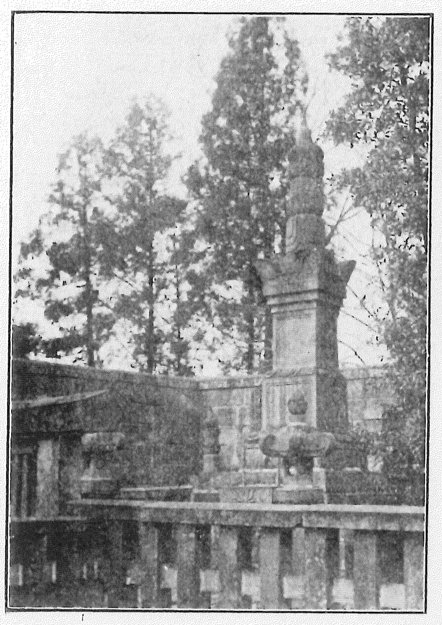 館林、谷越町にあった頃の榊原康政墓所